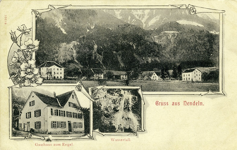 Postkarte «Gruss aus Nendeln»Ansicht vom Dorf, Gasthaus zum «Engel» und Wasserfall